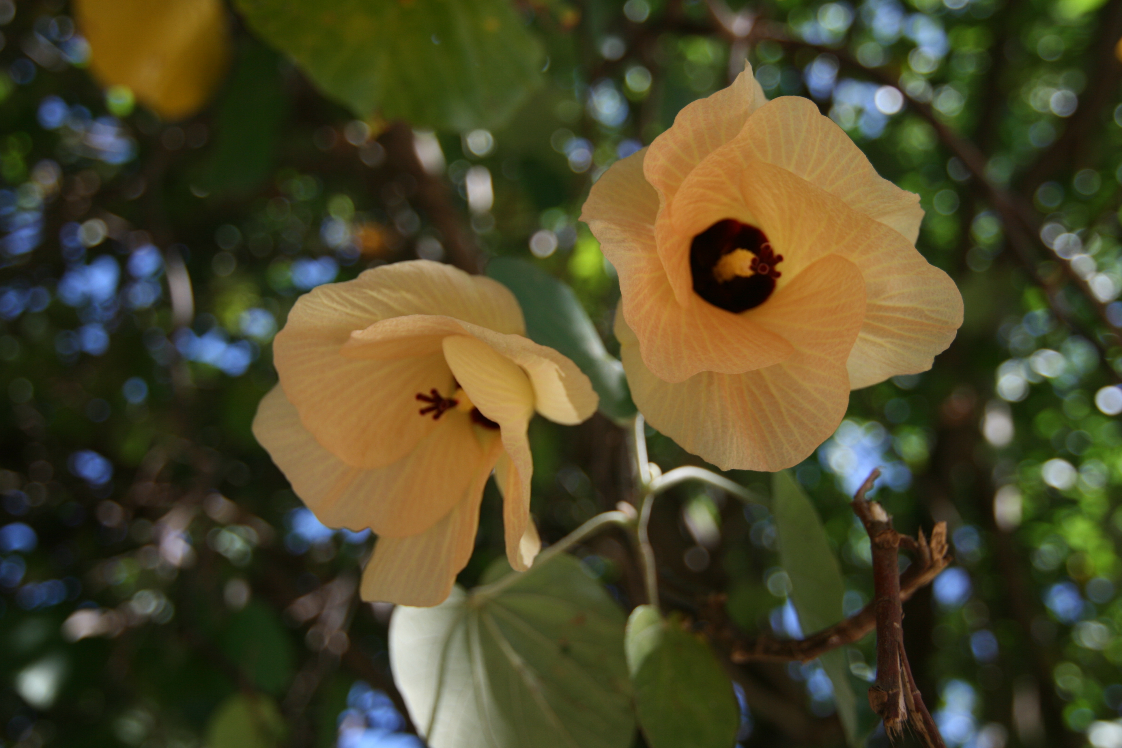 Fleur de pūrau (hibiscus tiliaceus) photographiée sur le parking du PK 18 à Punaauia, Tahiti, Polynésie française